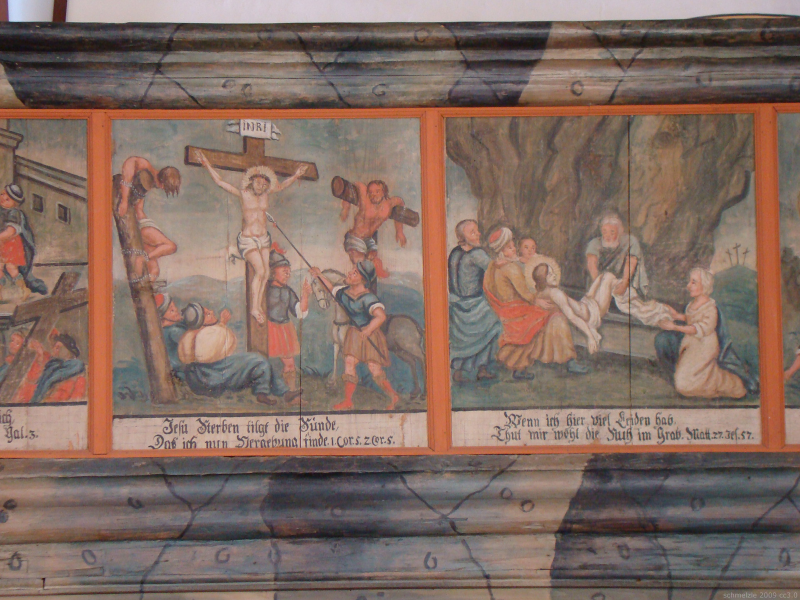 Kirche zum heiligen Kreuz, Weiler an der Zaber, Emporenbrüstung